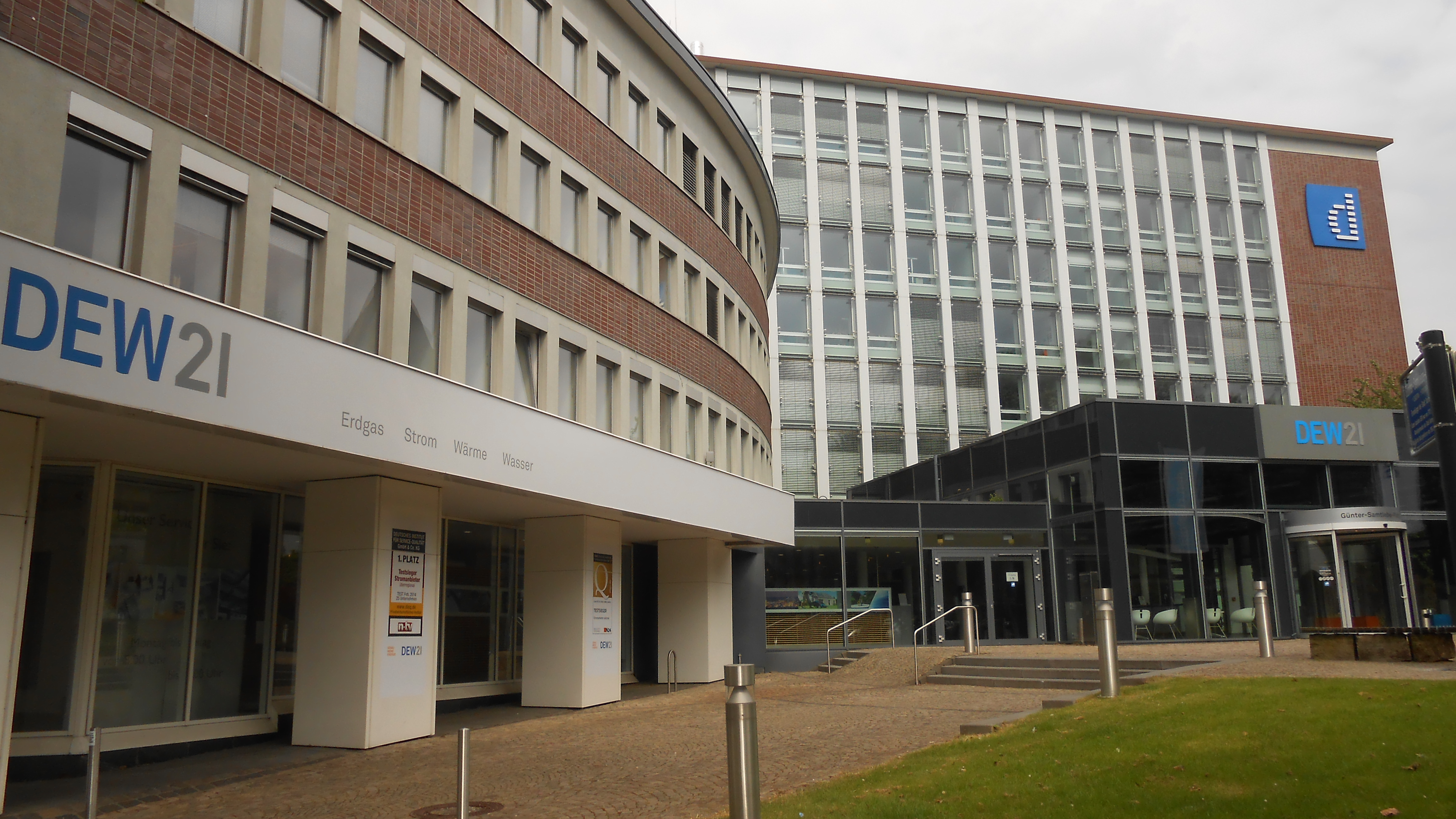 Das DEW21 Kundencenter (links) und das DEW21-Gebäude dahinter.